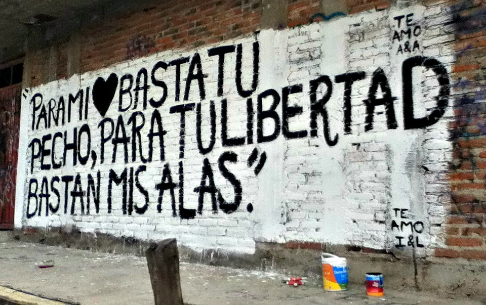 "Para mi corazón basta tu pecho, para tu libertad bastan mis alas." Verso del poeta chileno y premio Nobel Pablo Neruda, en una pintada en Atizapán de Zaragoza, México.